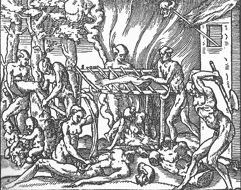 Équarrissage de la victime. Scène d'anthropophagie rituelle chez les Tupinamba du Brésil